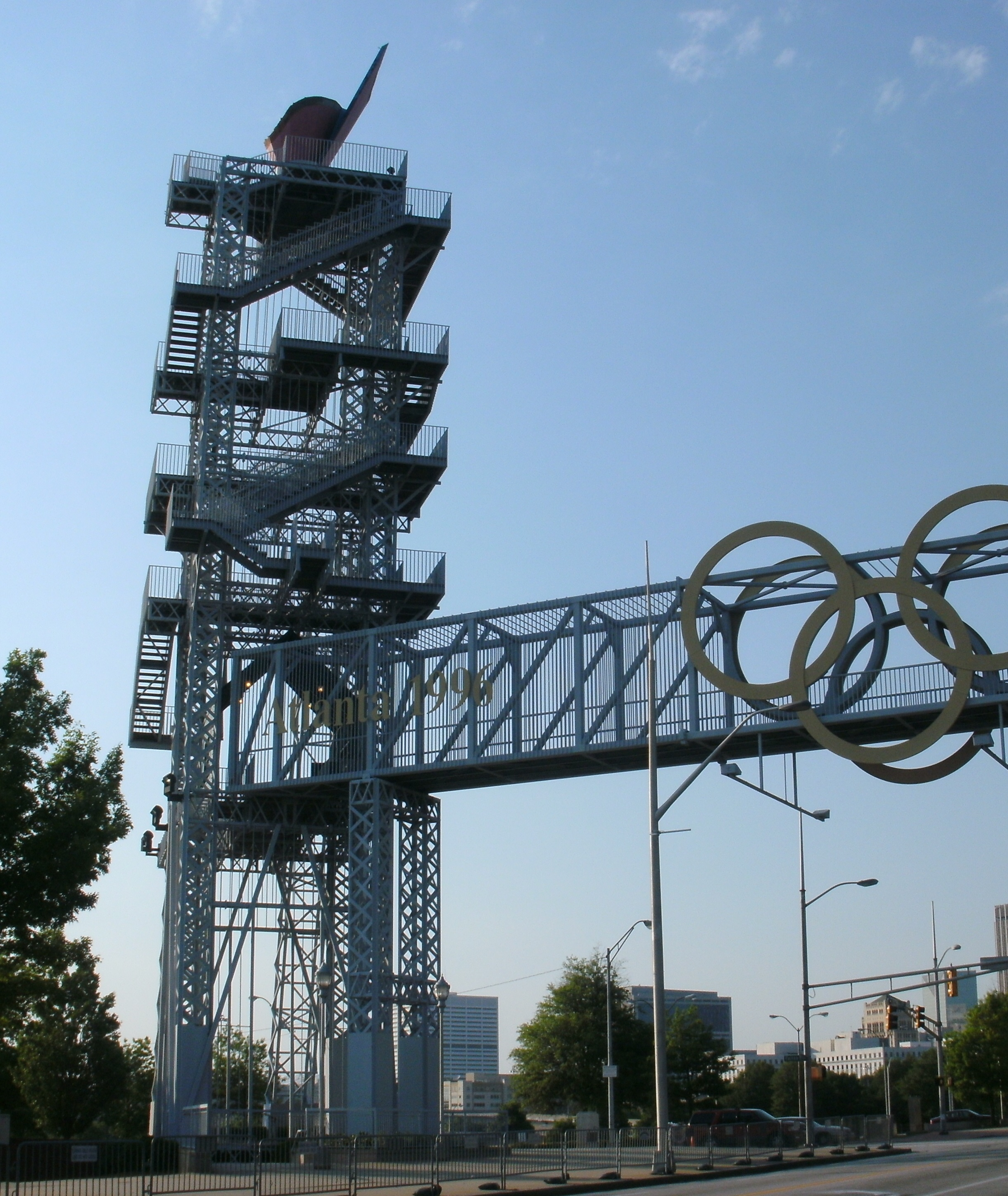 1996 Atlanta Summer Olympics cauldron, 2011